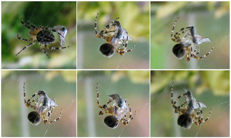 Eine Kreuspinne spinnt ihre Beute ein Andere Versionen: keine